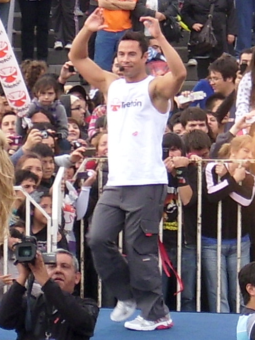 El bailarín Rodrigo Díaz participando del show de la Teletón en la Plaza de Armas de Maipú el sábado 3 de diciembre de 2011.